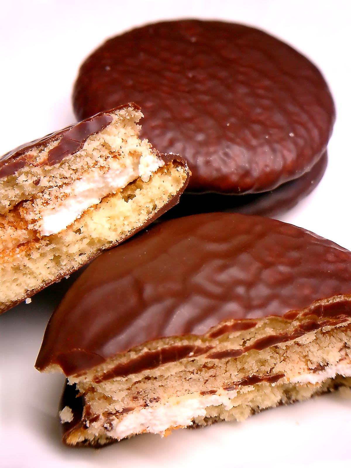 Chocolate_Pie ,초코파이